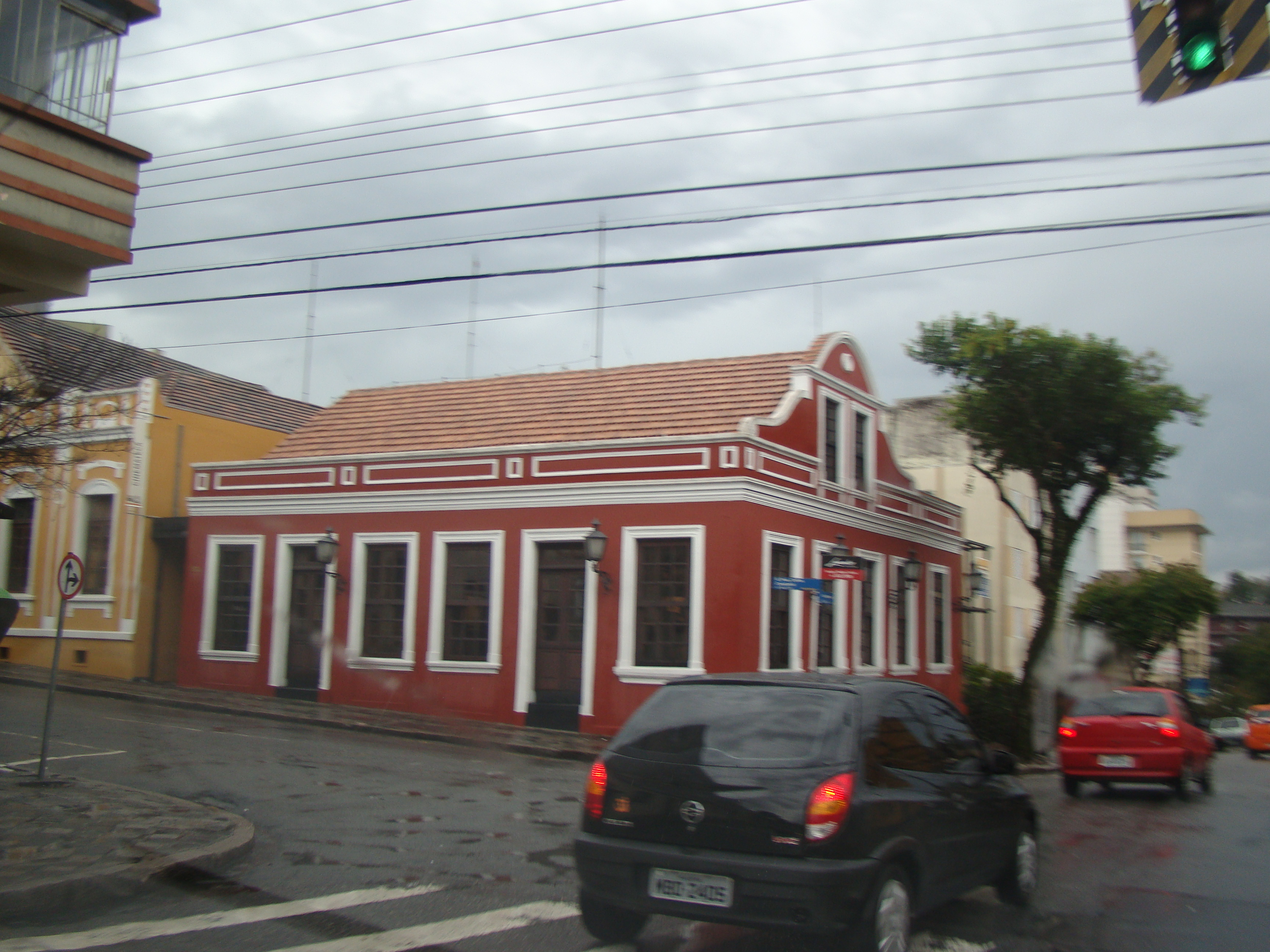 Cinemateca